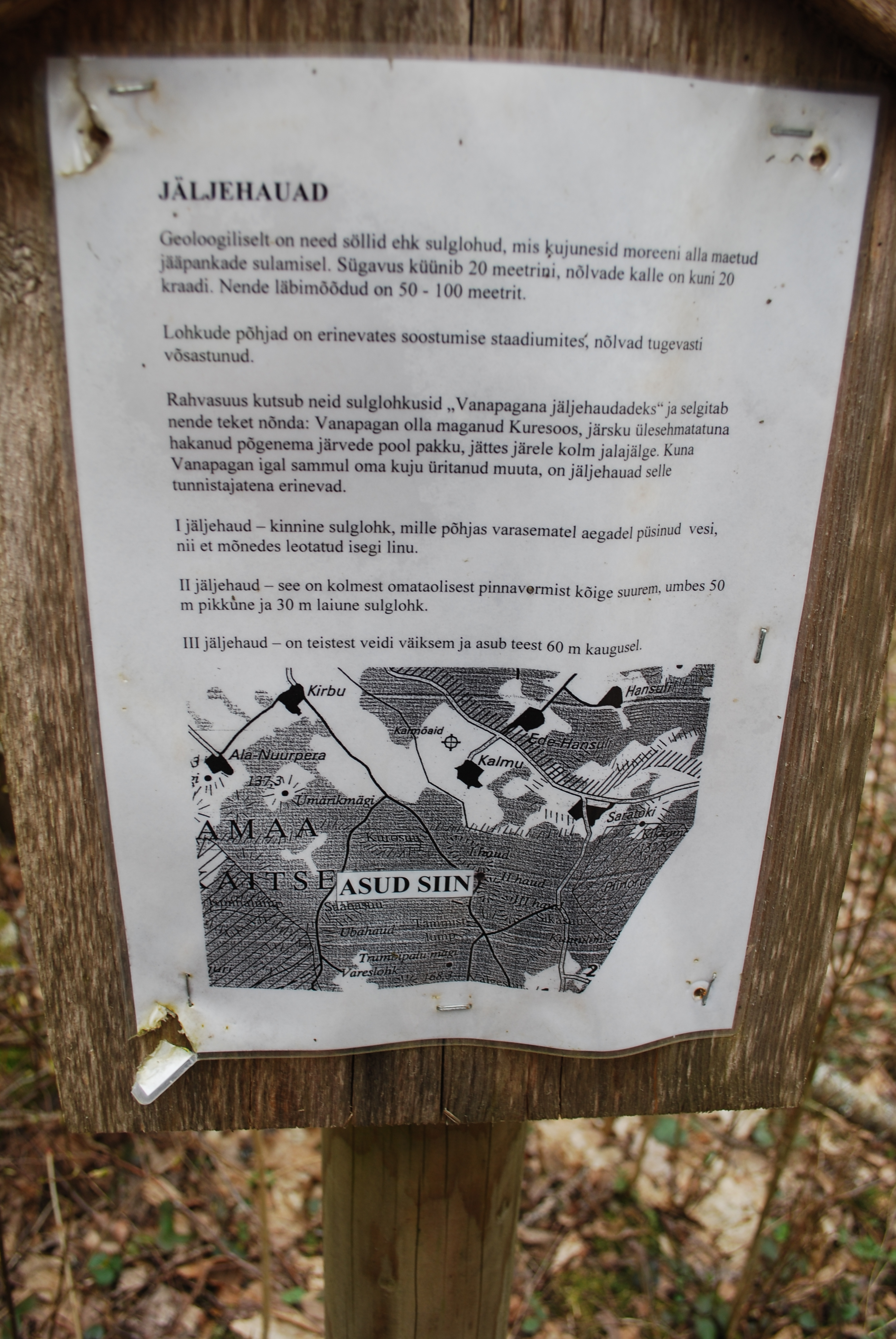 Infotahvel Paganamaal, mis kirjeldab Vanapagana jäljehaudu.